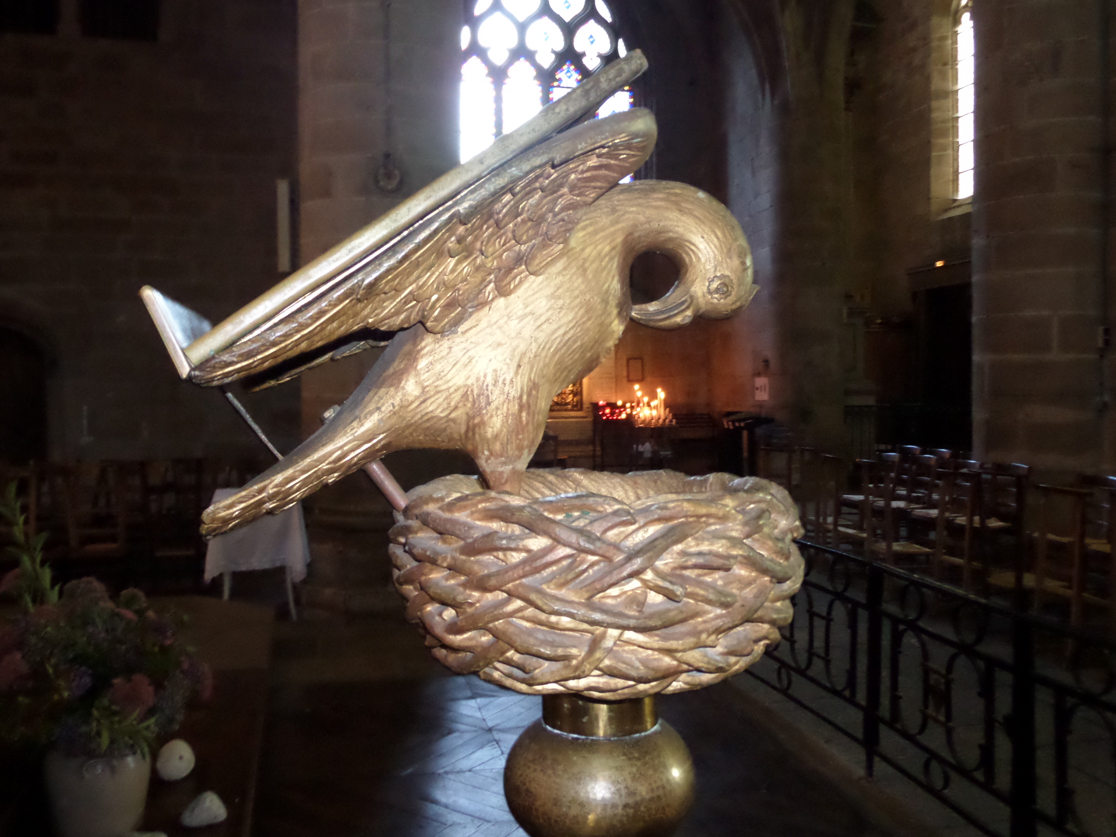 Dinan (Côtes-d'Armor, France), basilique St Sauveur, lutrin-pélican en bois doré.